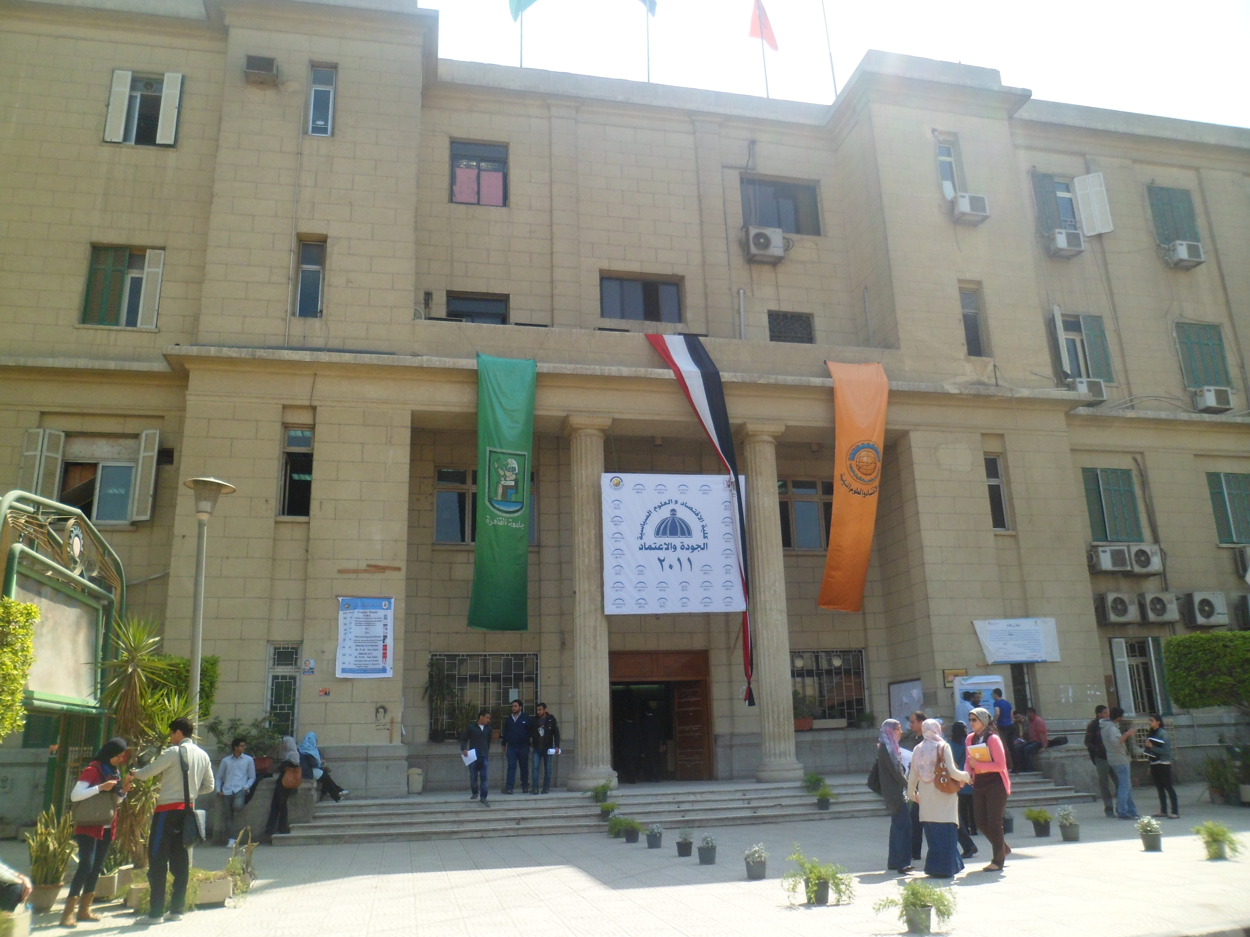 كلية الاقتصاد والعلوم السياسية، جامعة القاهرة.